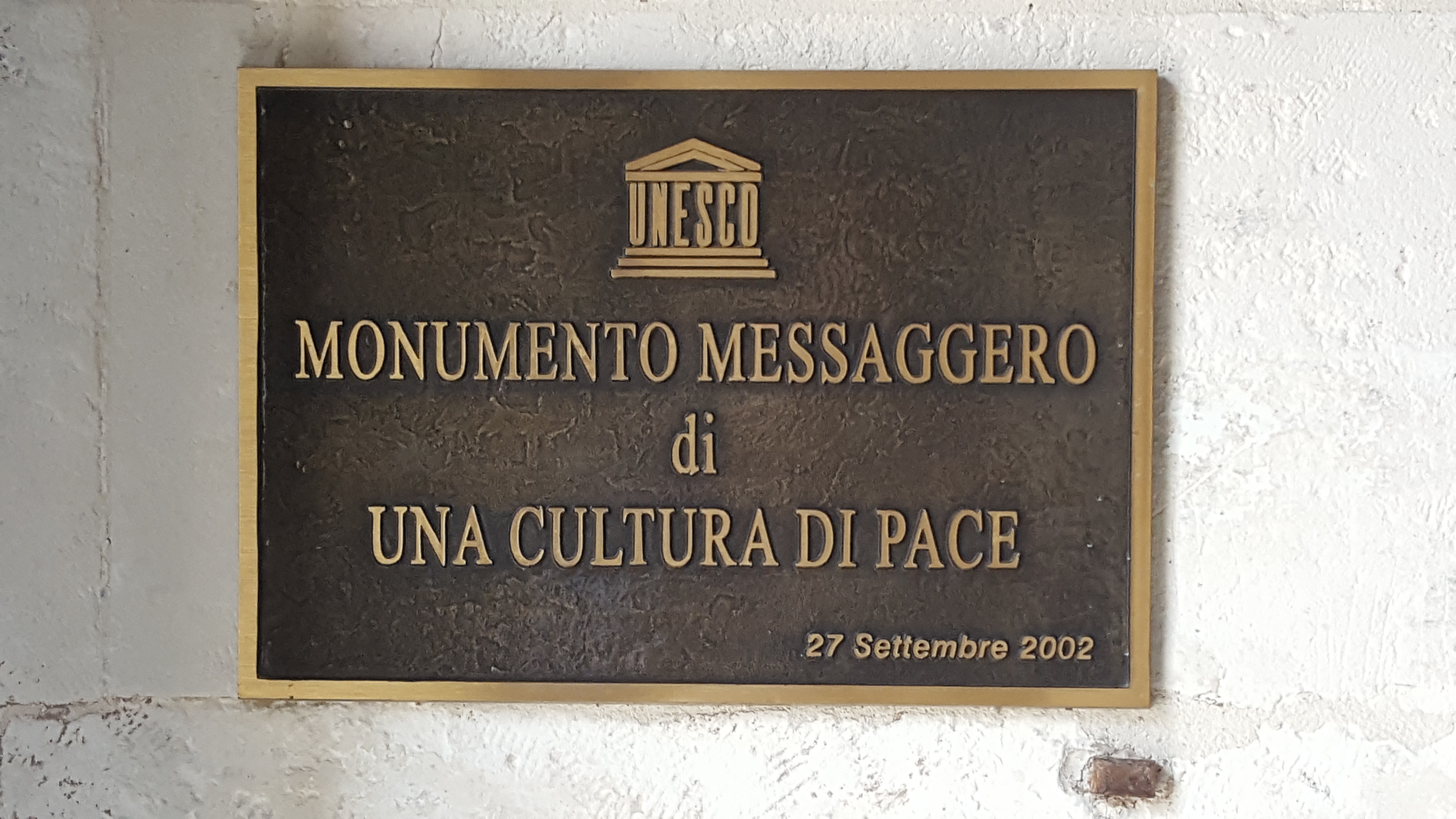 Monumento Messagero di una Cultura di Pace - basilica di San Martino, Martina Franca